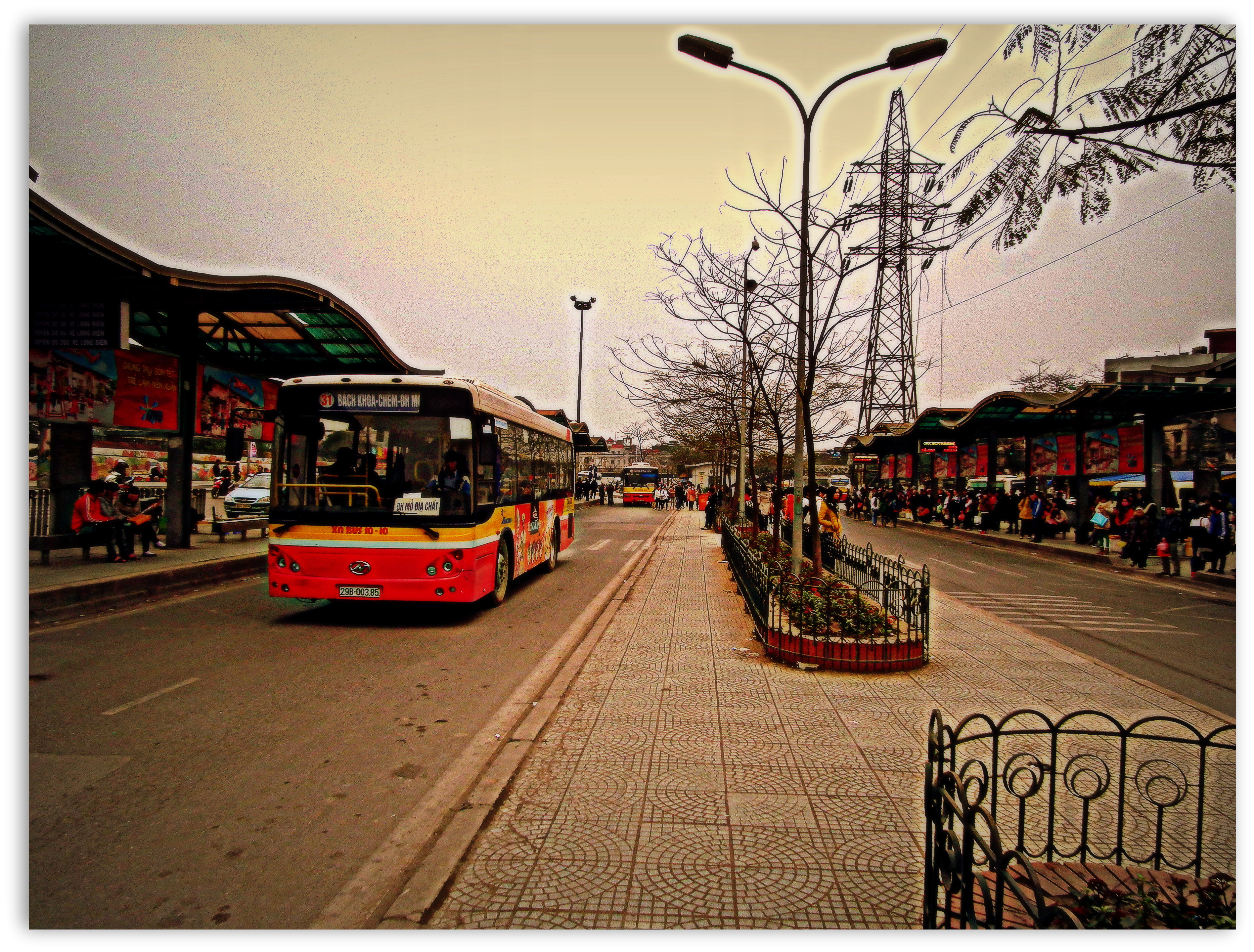 LONG BIEN BUS STATION HA NOI VIETNAM FEB 2012